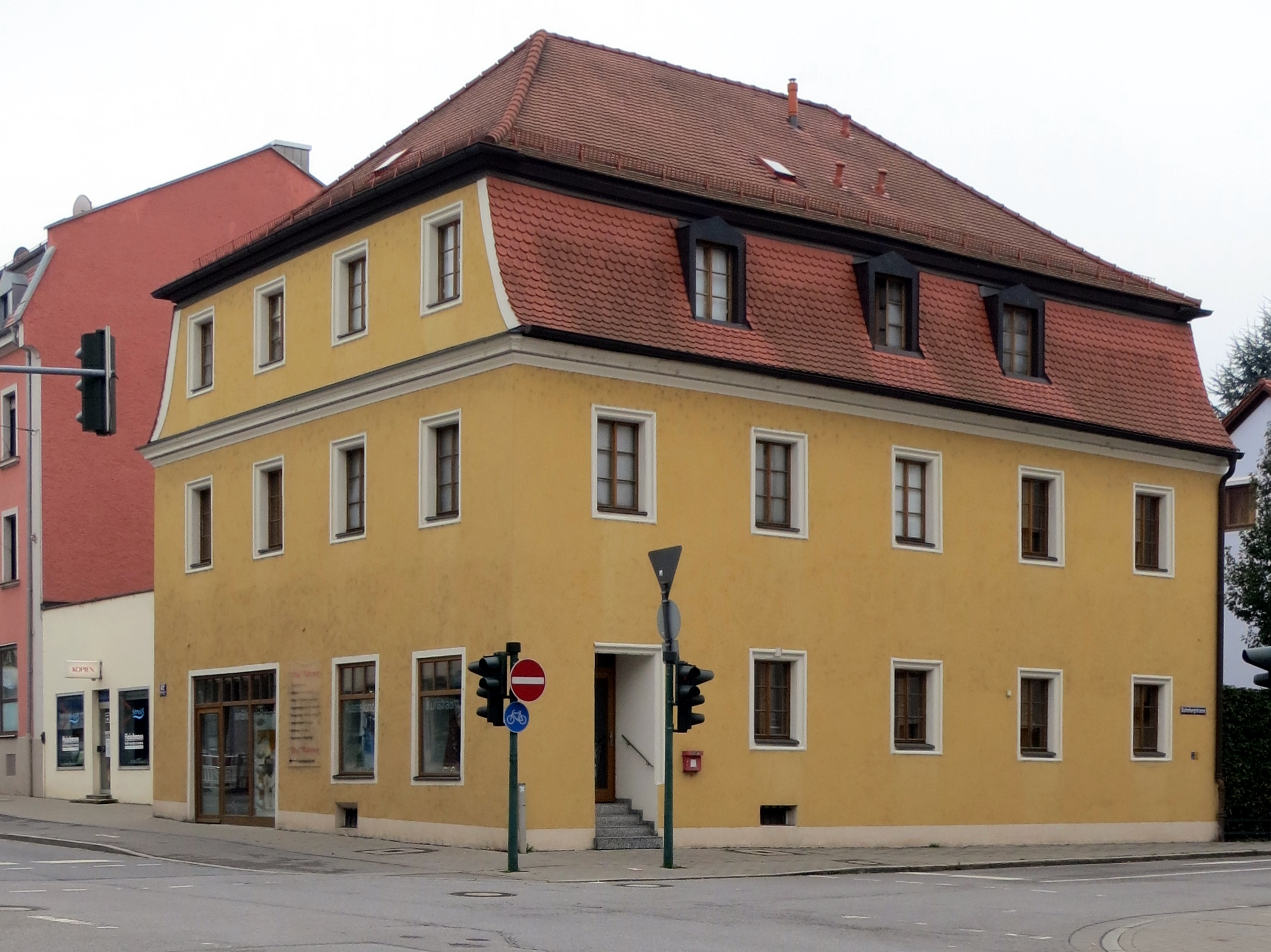 Wohnhaus Ecke Kumpfmühler Straße und Gutenbergstraße im Ortsteil Kumpfberg in Regensburg - Ansicht aus NordOst